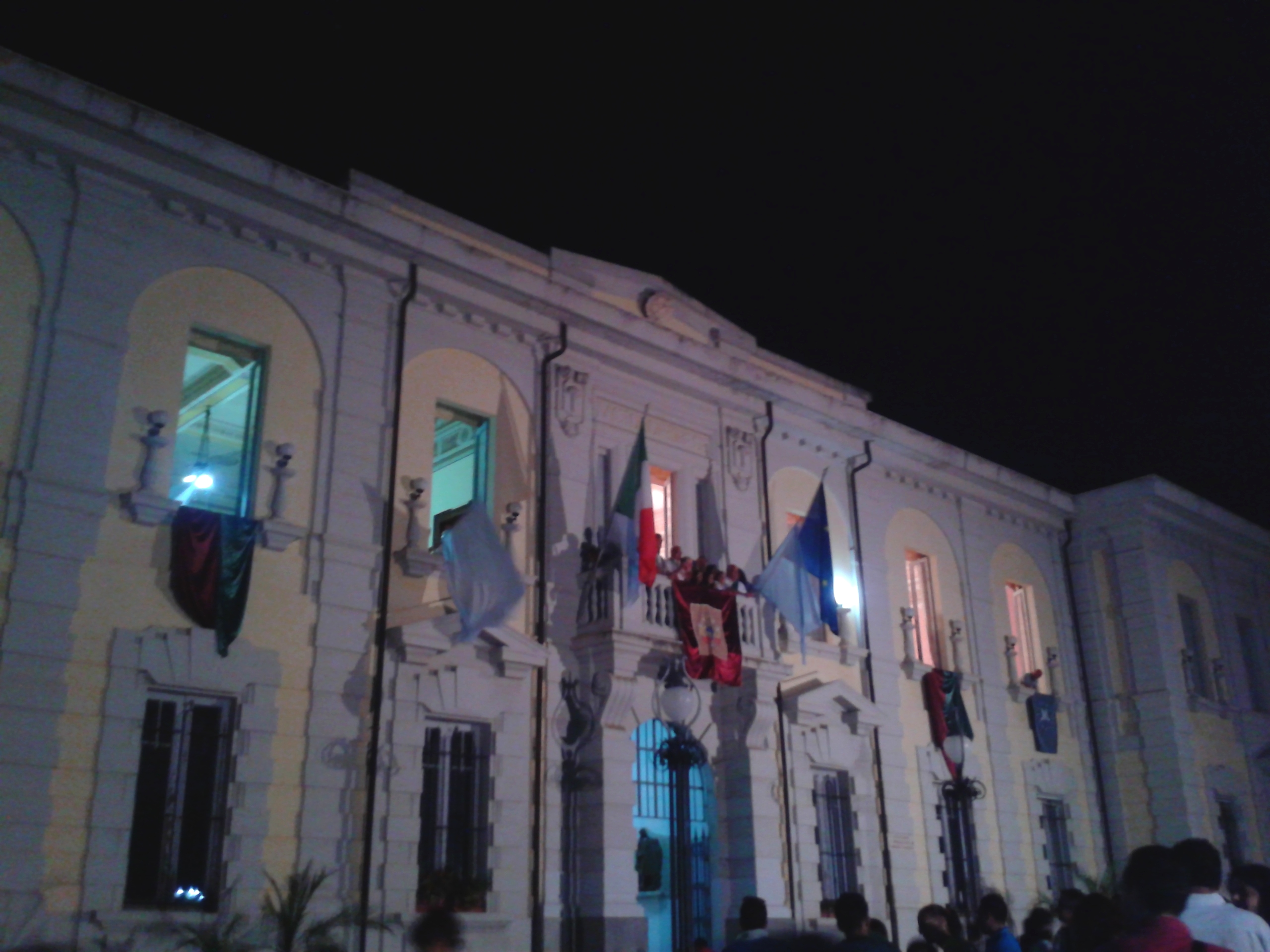 Palmi. Annuncio della selezione delle tre bambine scelte per l'elezione dell'Animella 2013 della Varia di Palmi.